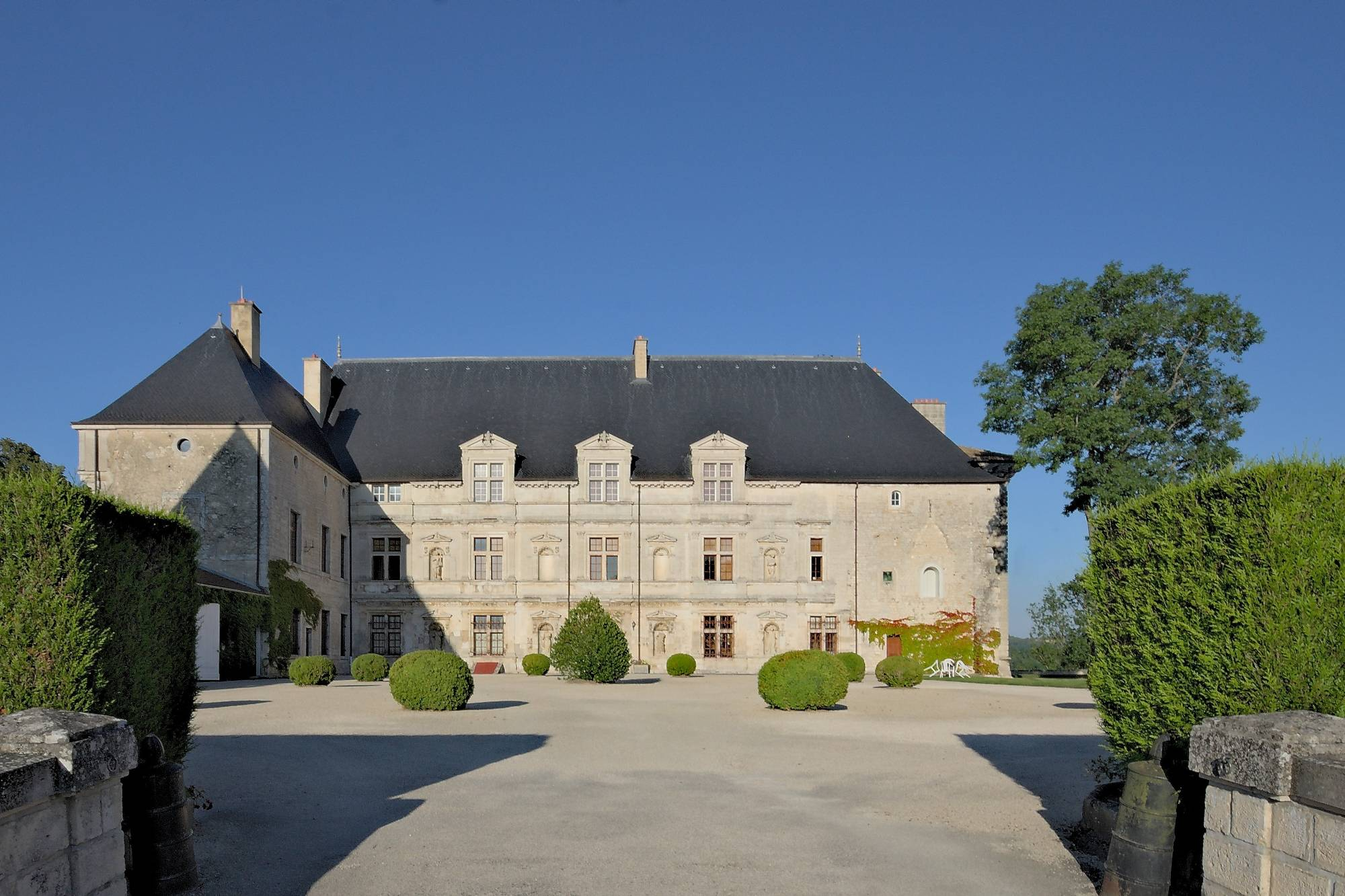 Meuse, château de Montbras, açade principale